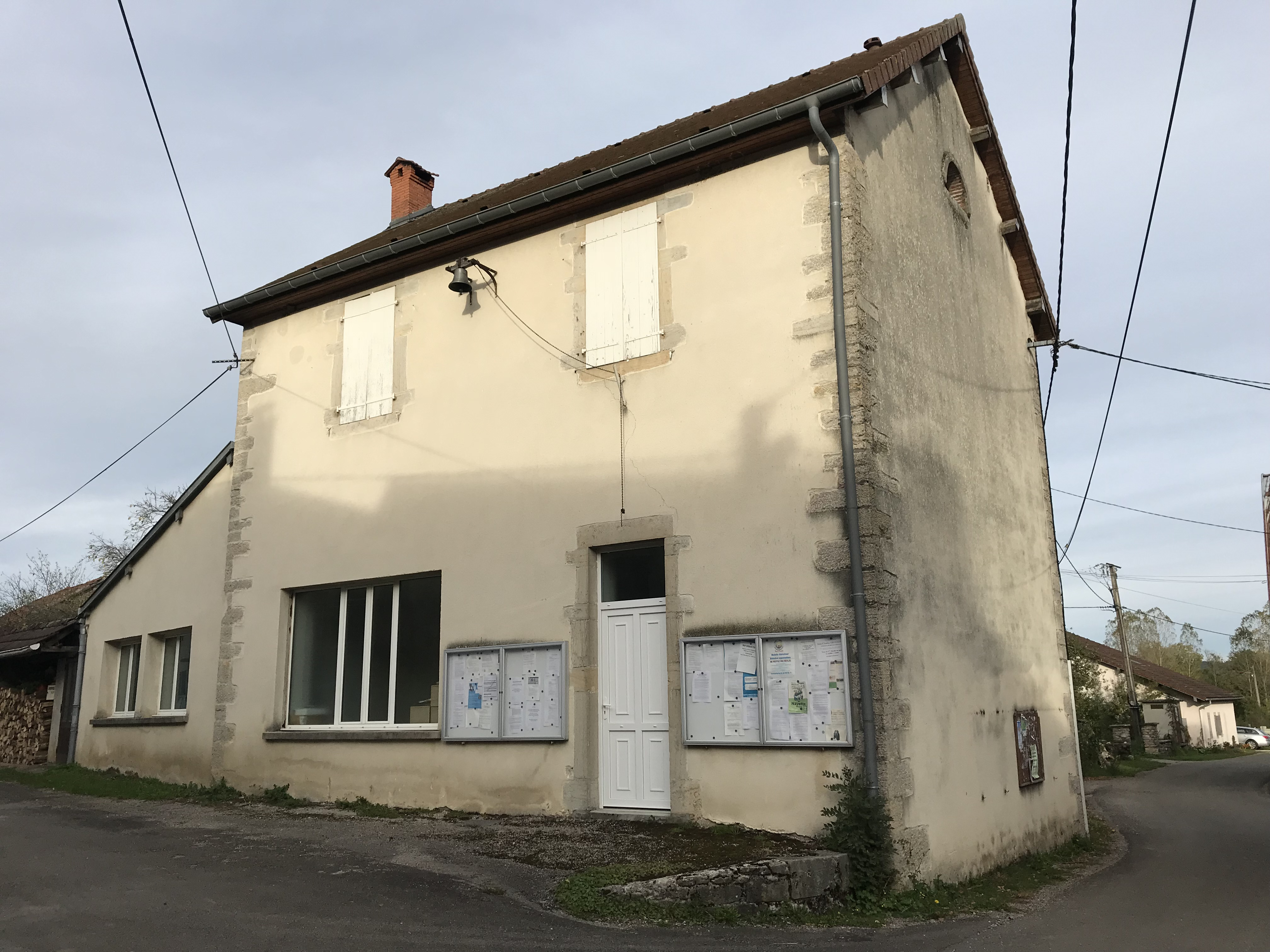 Mairie de Beffia (Jura, France) en octobre 2017.